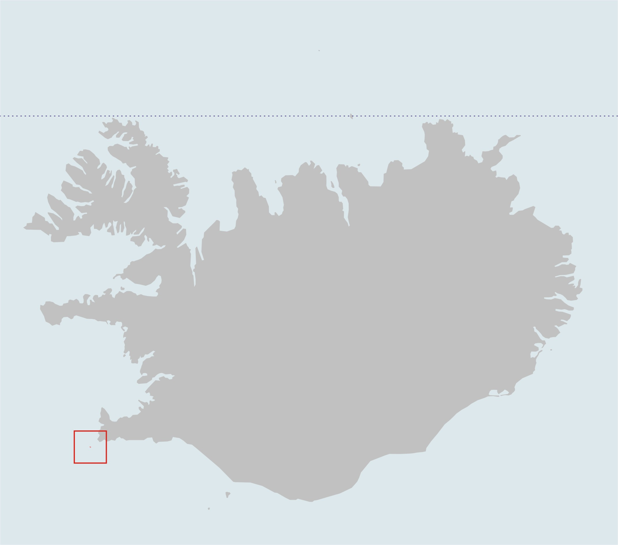 Lage der isländischen Insel Eldey